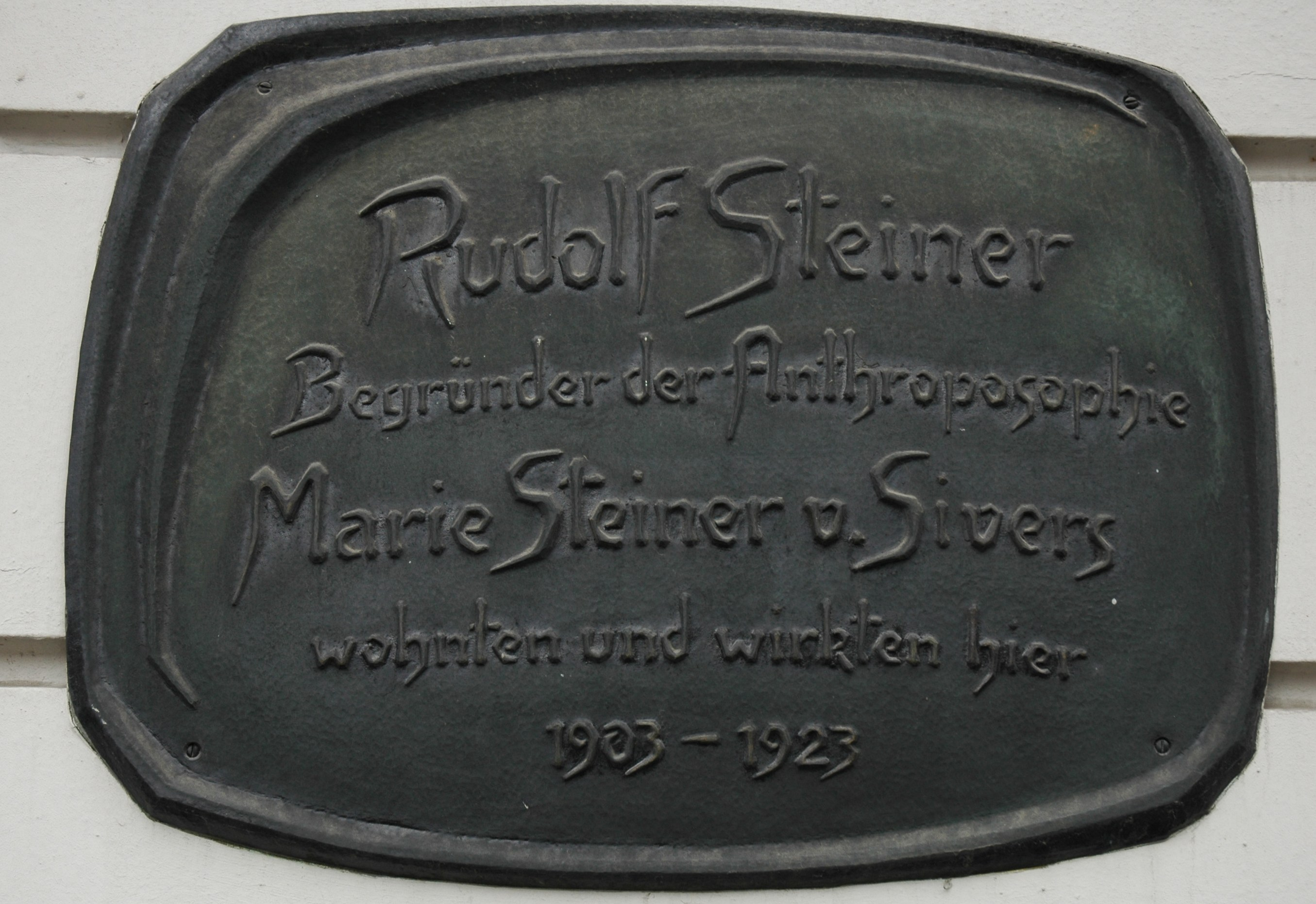 Rudolf Steiner was an Austrian philosopher and the founder of Anthroposophy. Rudolf Steiner Begründer der Anthroposophie Marie Steiner v. Sivers wohnten und wirkten hier 1903 - 1923